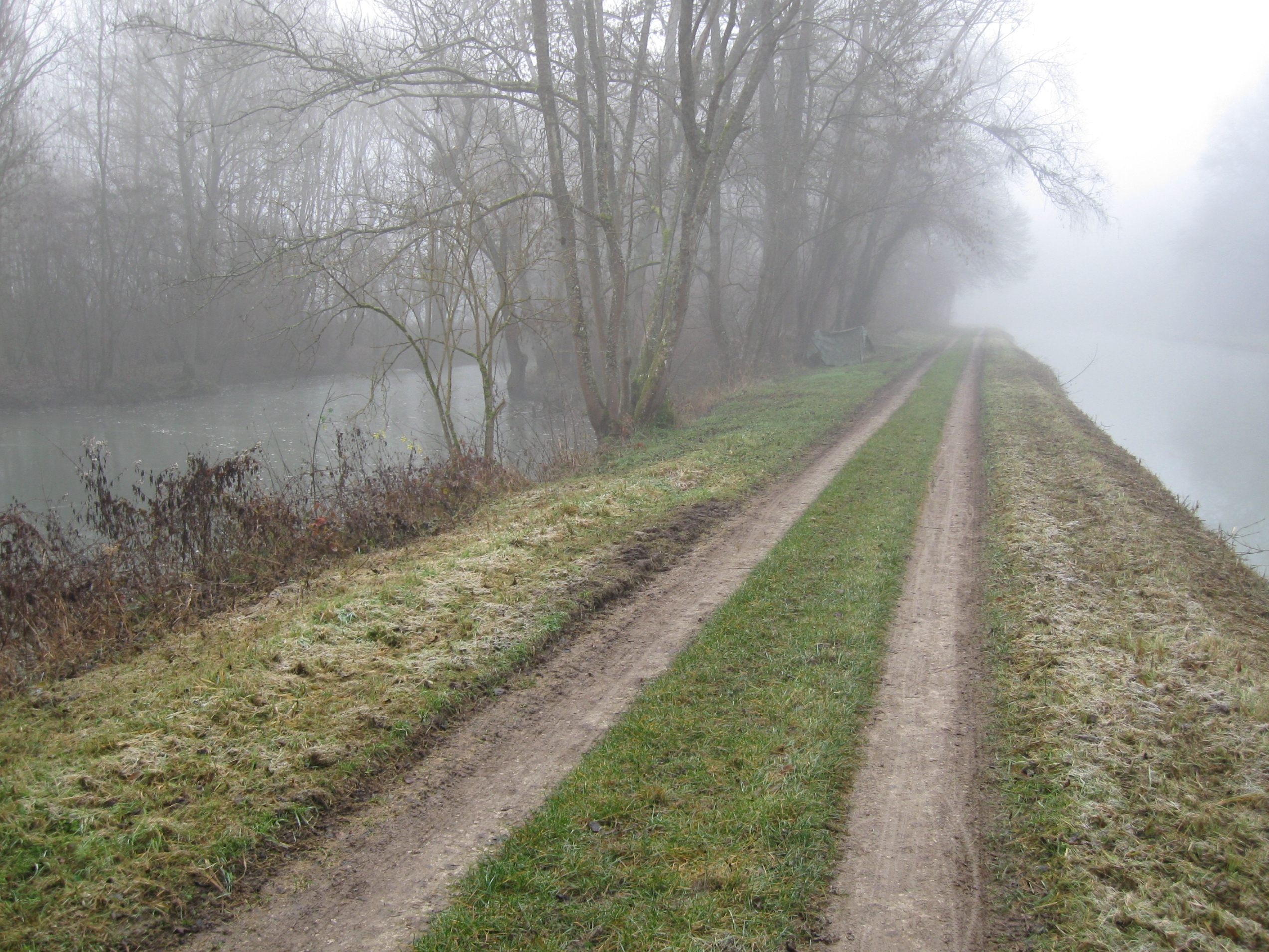 Le Loing (à gauche) et le canal de Briare (à droite), sur le territoire de la commune de Conflans-sur-Loing. Vue vers le sud-ouest.